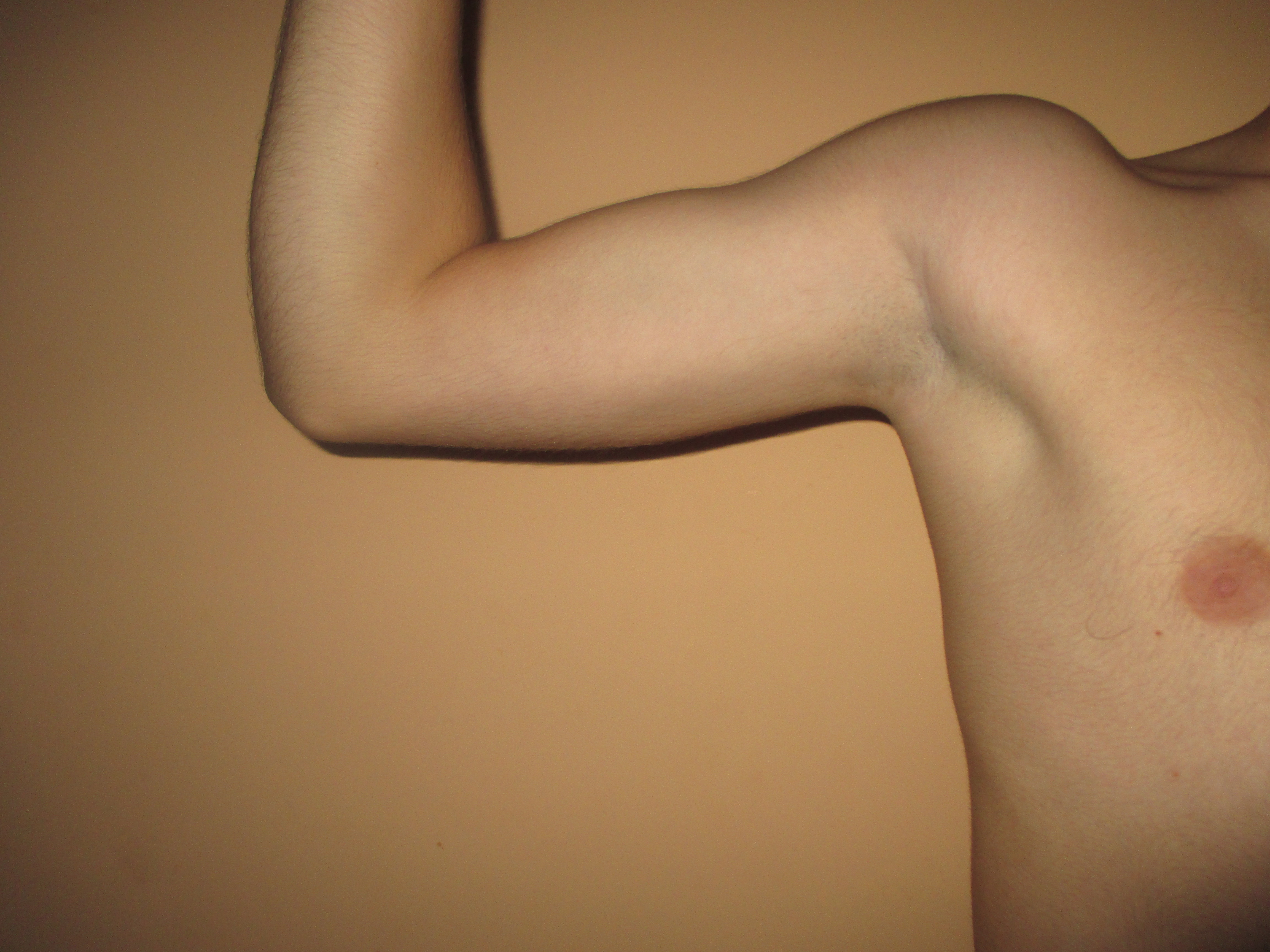 aisselle